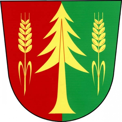 znak, Zálesí, okres Znojmo